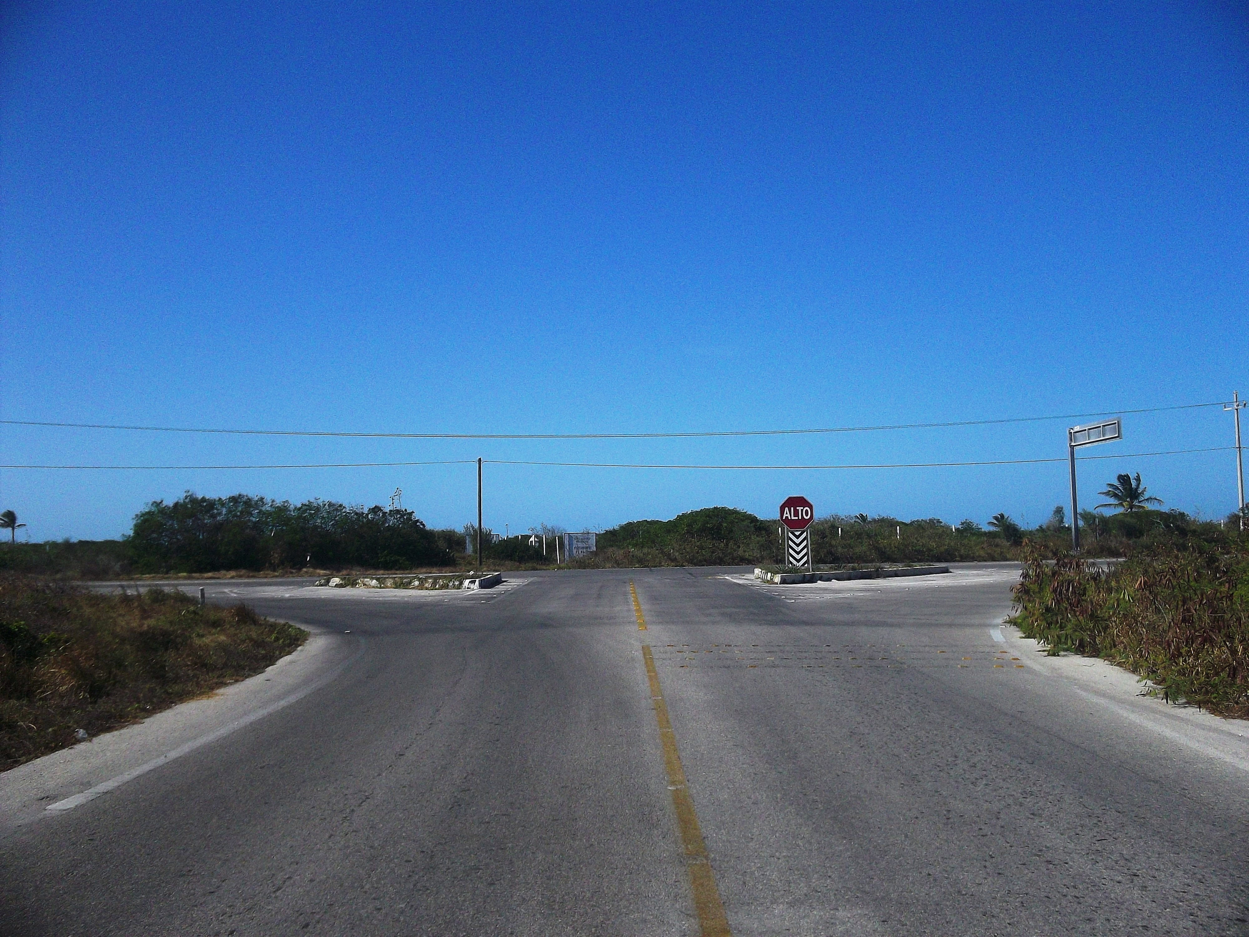 Vista de Xtampú, Yucatán.